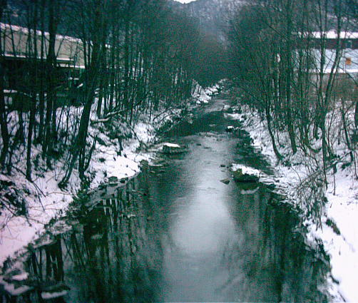 Weißache bei Kufstein - gemeinfrei - Foto by mysteryku